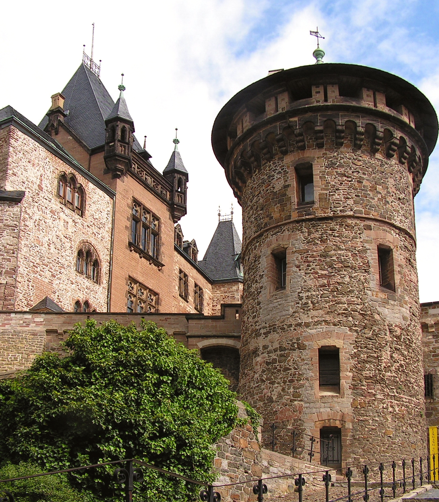 Wehranlagen Schloss Wernigerode Harz Foto 2005 Wolfgang Pehlemann Wiesbaden PICT0025